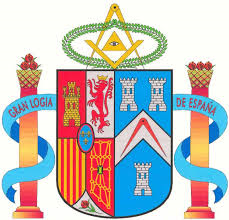 Escudo de la Gran Logia de España